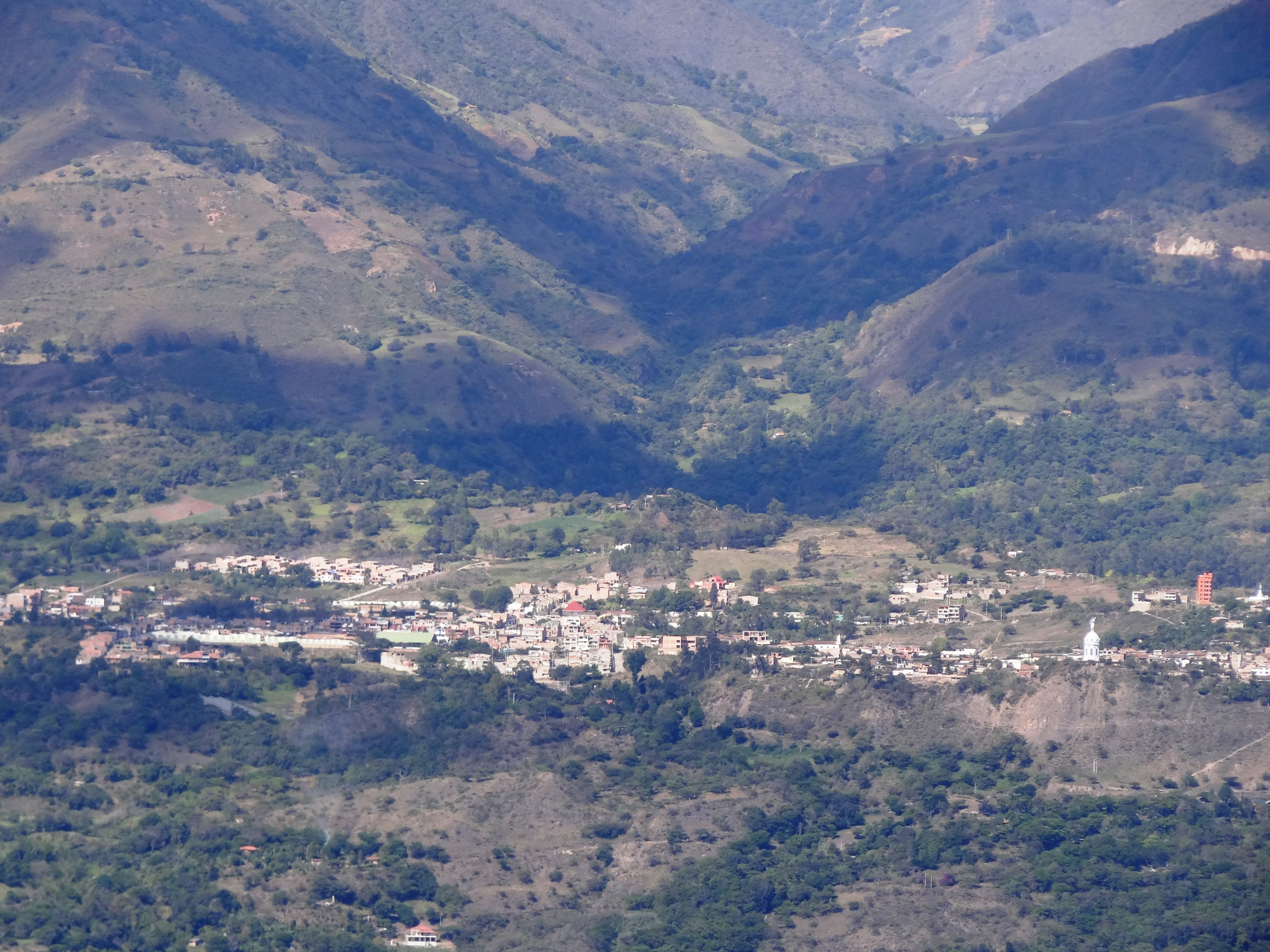 Área urbana y alrededores del municipio de Soatá, departamento de Boyacá, Colombia.